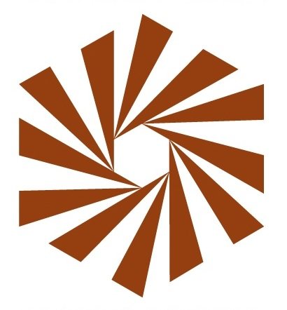 Logo, sans texte, du label "Grand Site de France"